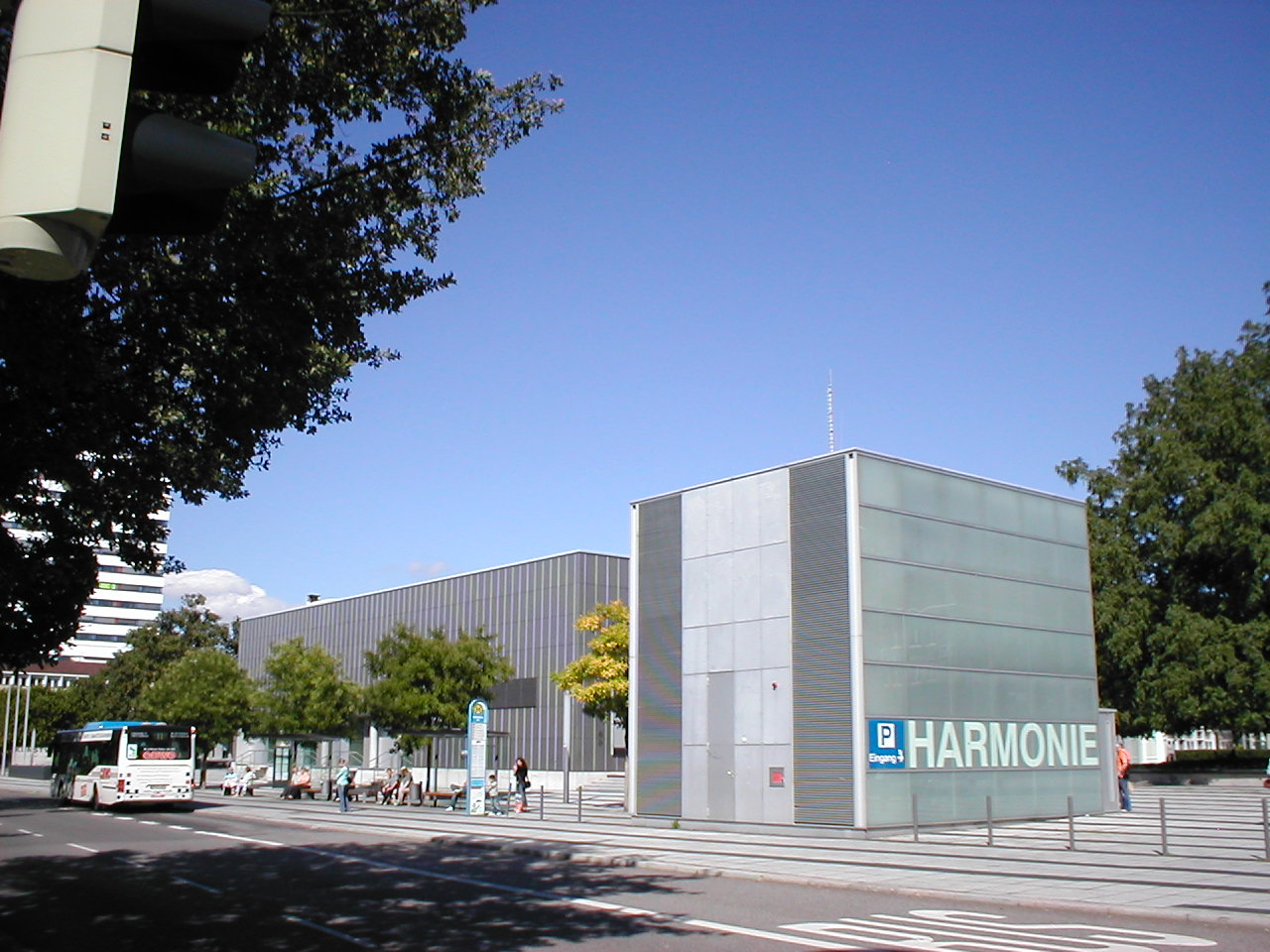 Veranstaltungszentum Harmonie in Heilbronn